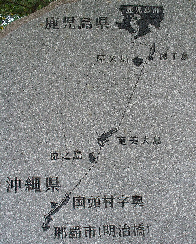 一般国道58号沖縄県国頭村奥-国道沿線モニュメント石碑